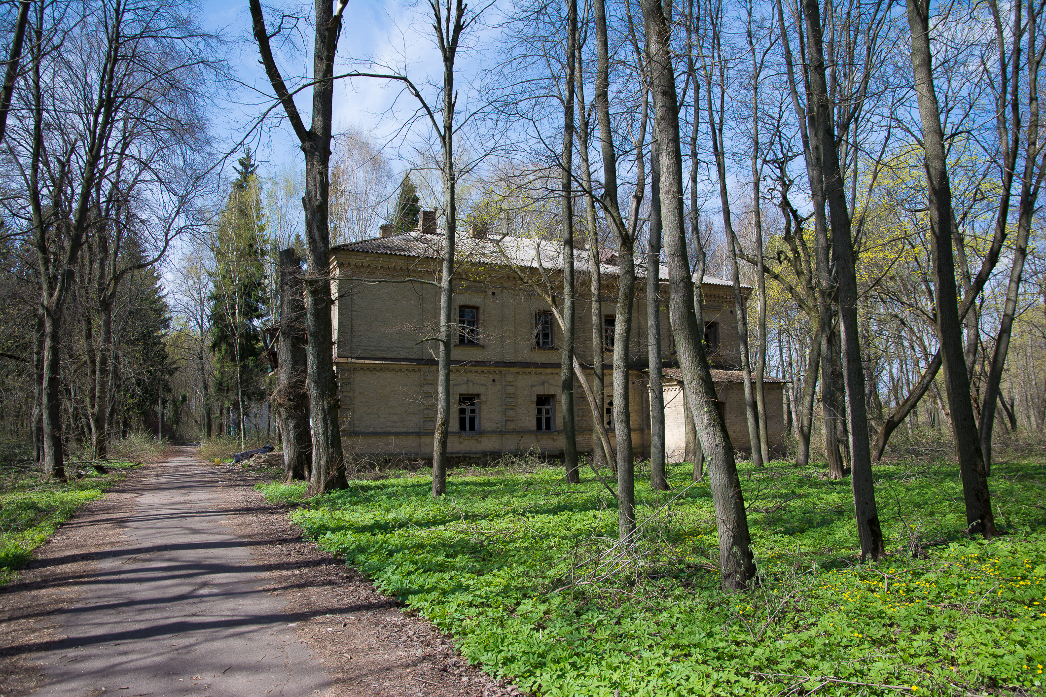 Парк, Тиниця, вул.Матросова, 3